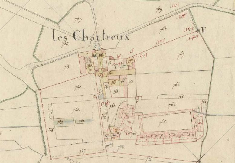 Plan de la chartreuse du Liget sur le cadastre napoléonien